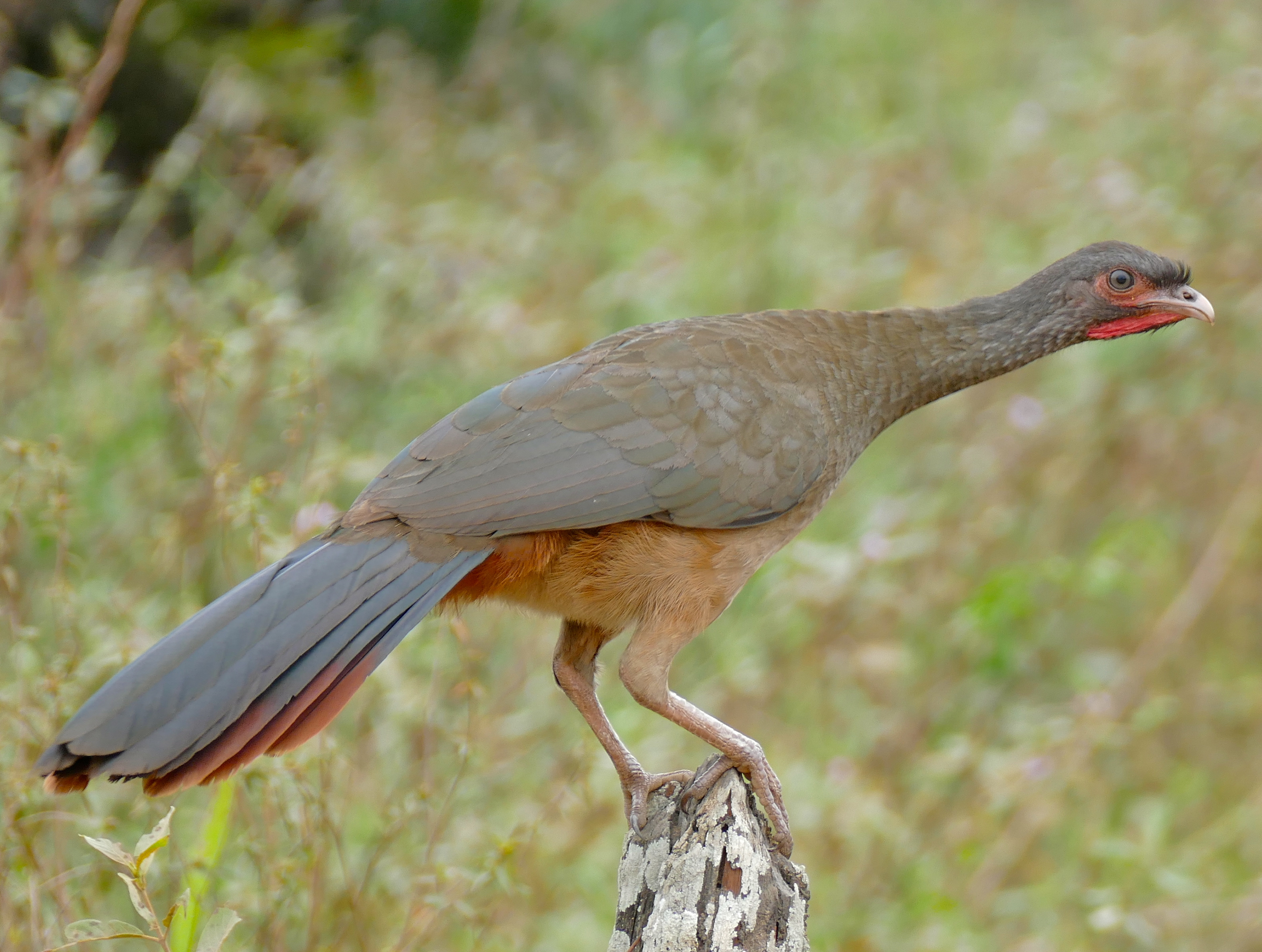 Transpantaneira, Poconé, Mato Grosso, BRAZIL